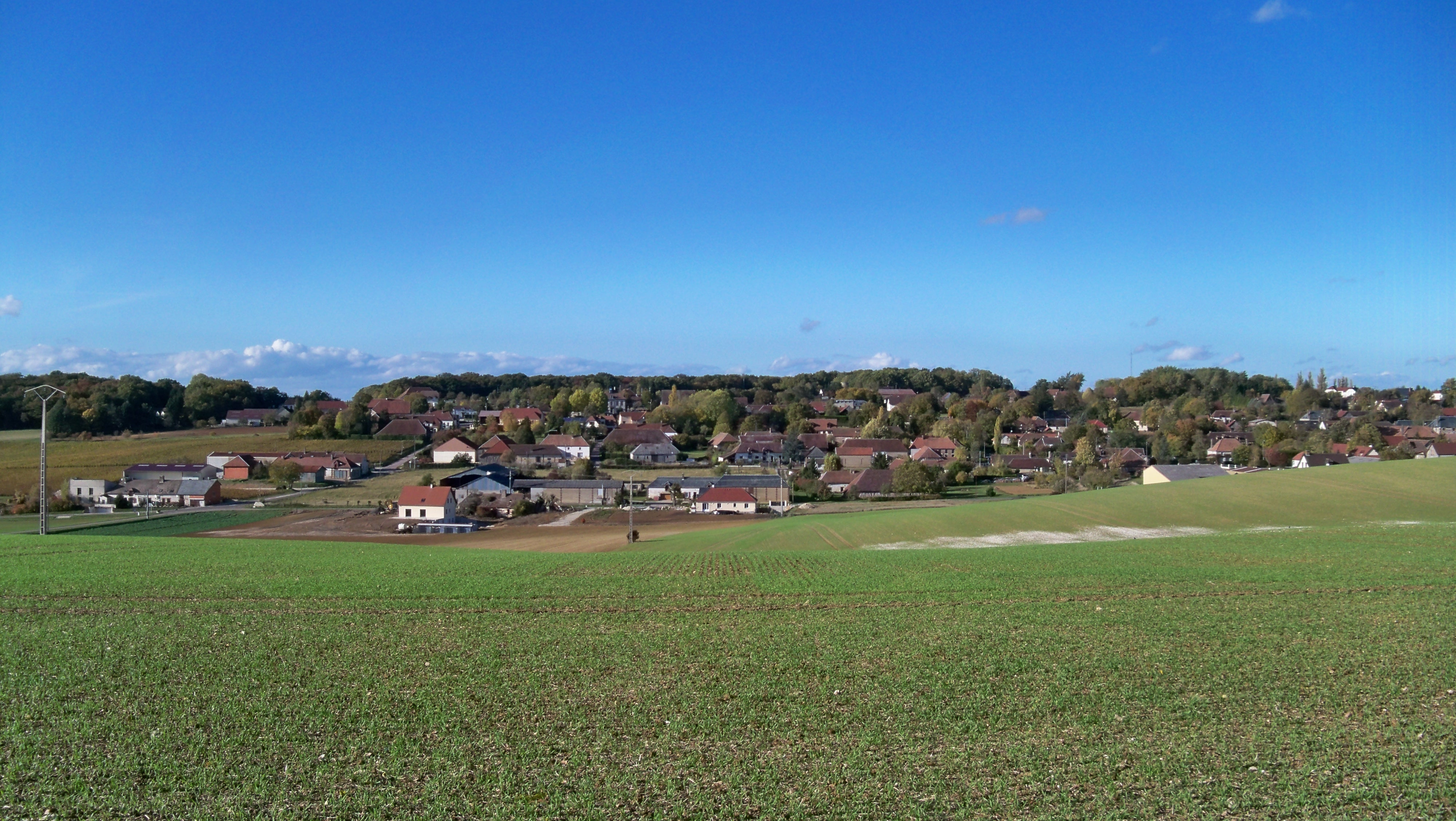 Commune de Montgueux, dans l'Aube